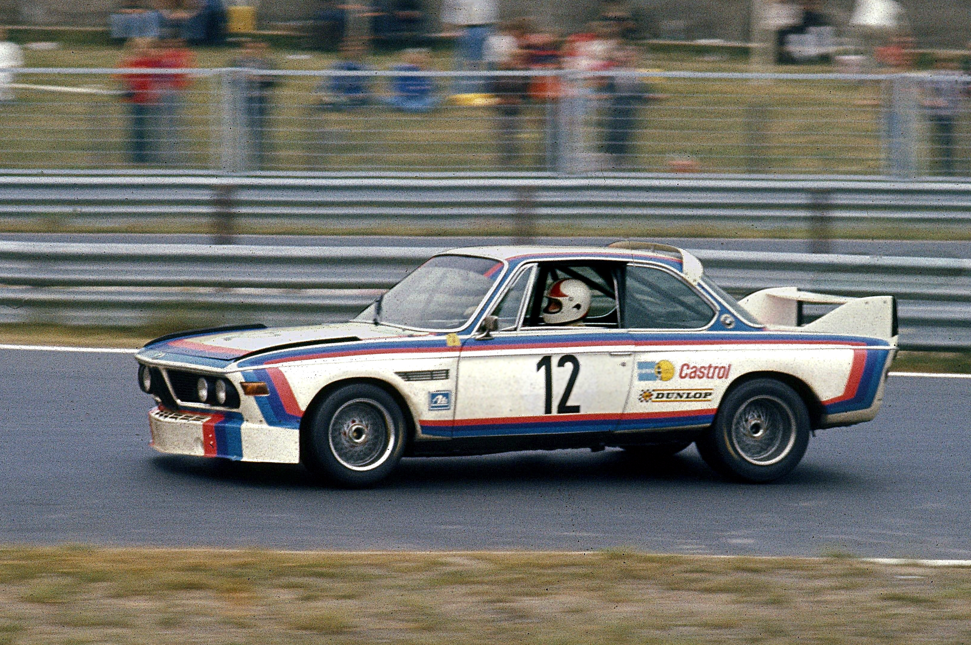 Chris Amon auf BMW 3.0 CSL beim 6-Stunden-Rennen für Tourenwagen 1973 am Ende der Zielgeraden des Nürburgrings. Amon/Stuck gewannen das Rennen mit 42 Runden in 6.03.06,5 Std. bzw. mit 158,5 km/h. Der Wagen leistete laut Programmheft etwa 380 PS; Gewicht 1065 kg.